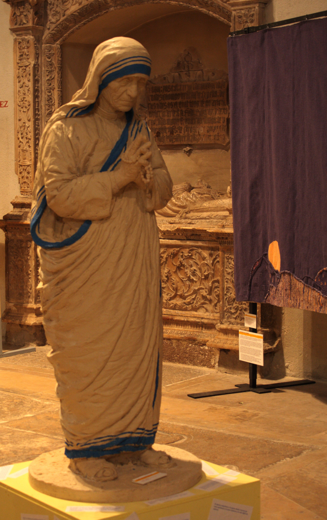 Madre Teresa de Calcula Catedral Alcalá de Henares Comuniad de Madrid España